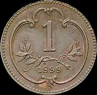 1 heller, 1899 (Austria) - reverse